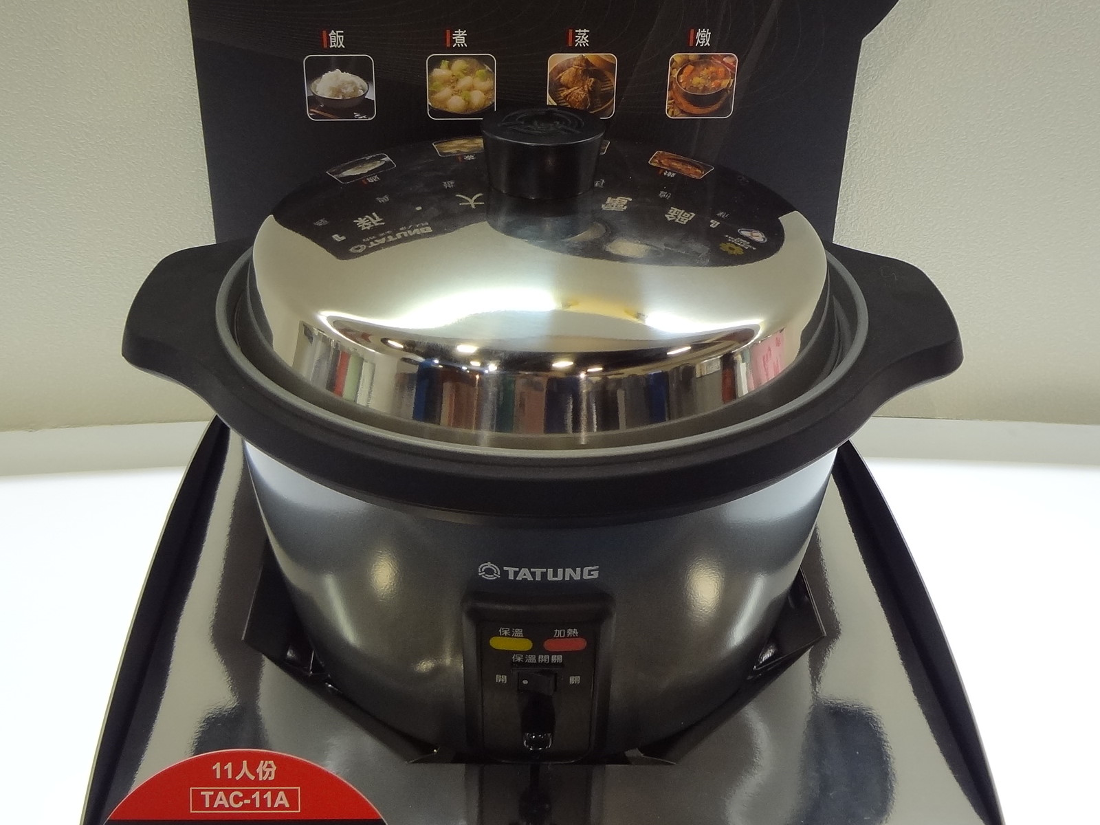 2013年台北資訊月，大同公司攤位展示的大同電鍋TAC-11A。